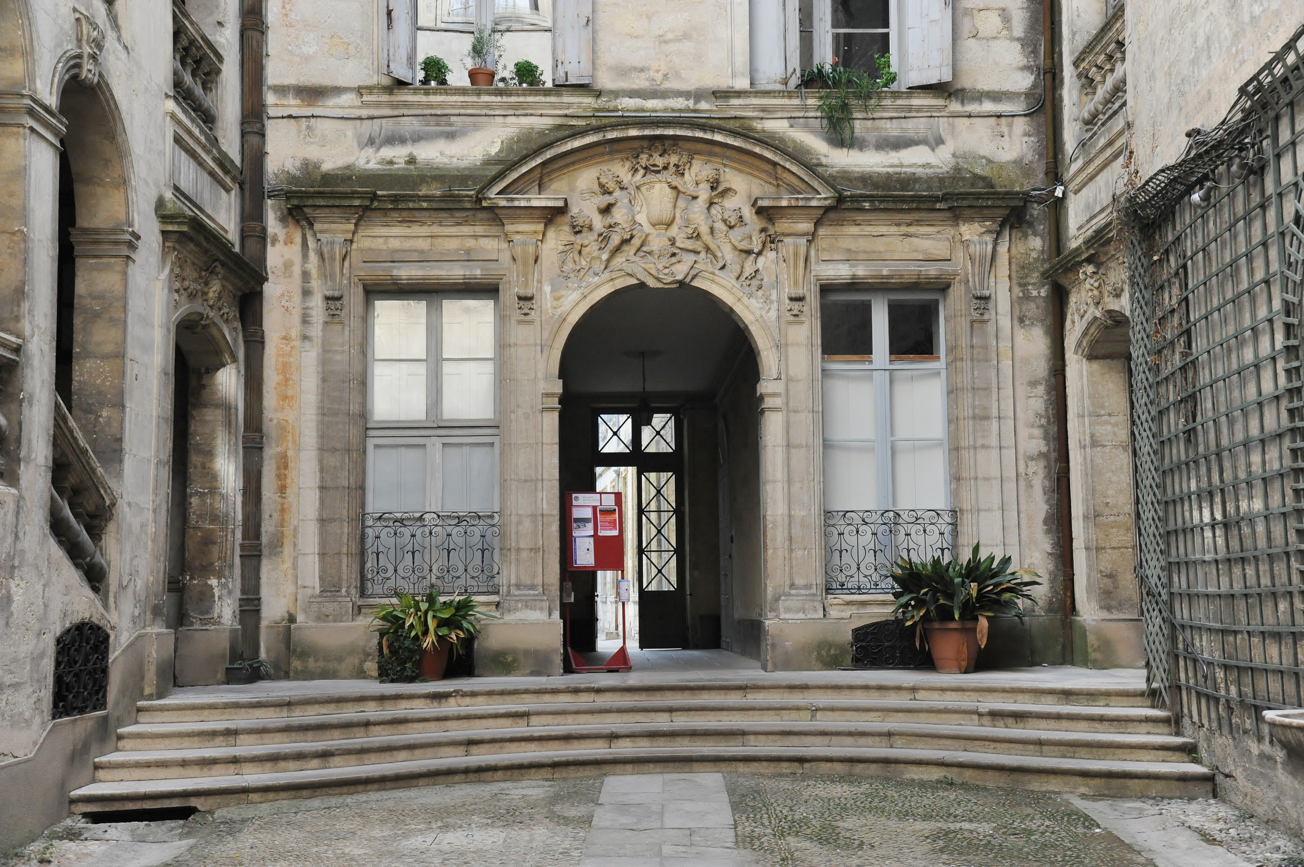 Hôtel des Trésoriers de la Bourse, XVIIème siècle, Montpellier.